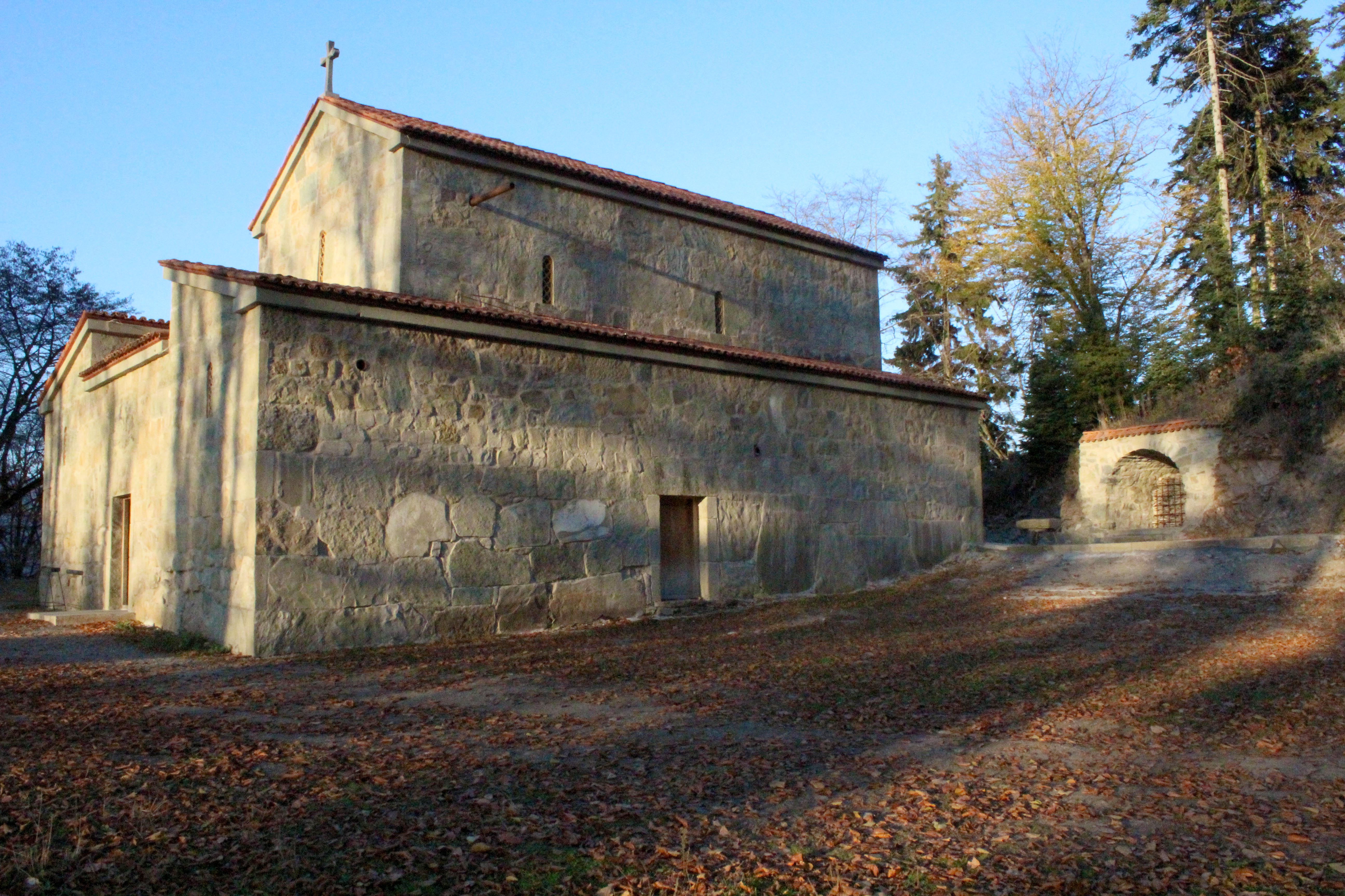 ფოთოლეთის ეკლესია